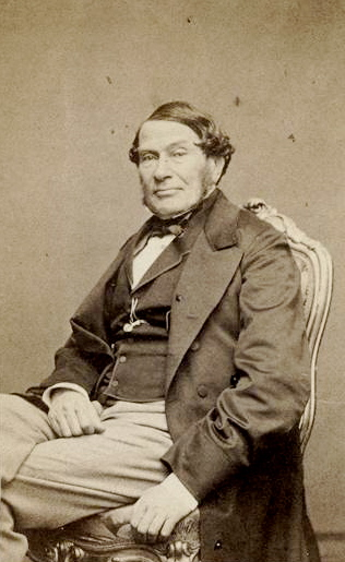 Achille Fould (* 17. November 1800; † 5. Oktober 1867), französischer Finanz- und Staatsmann